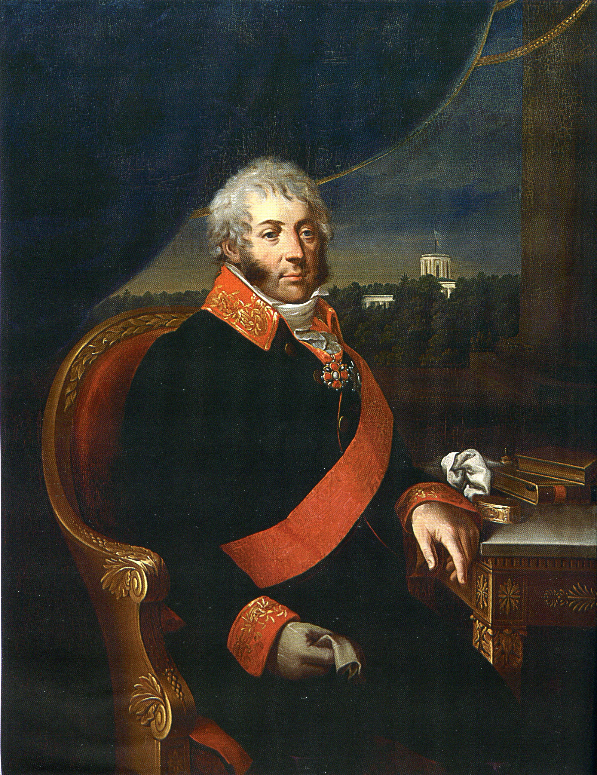 Николай Алексеевич Голицын (1751 - 1809)